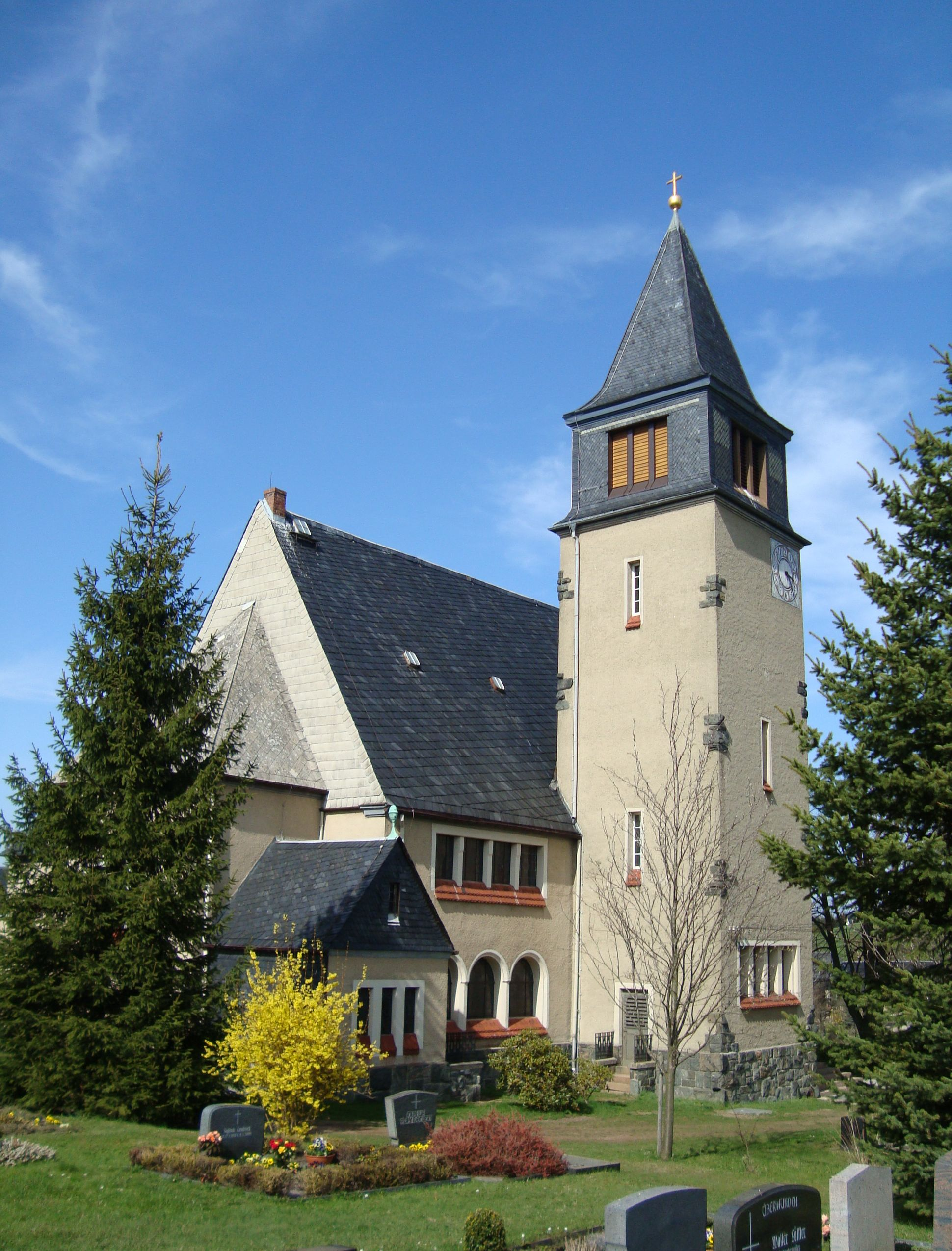 Kirche in Adorf im Erzgebirge